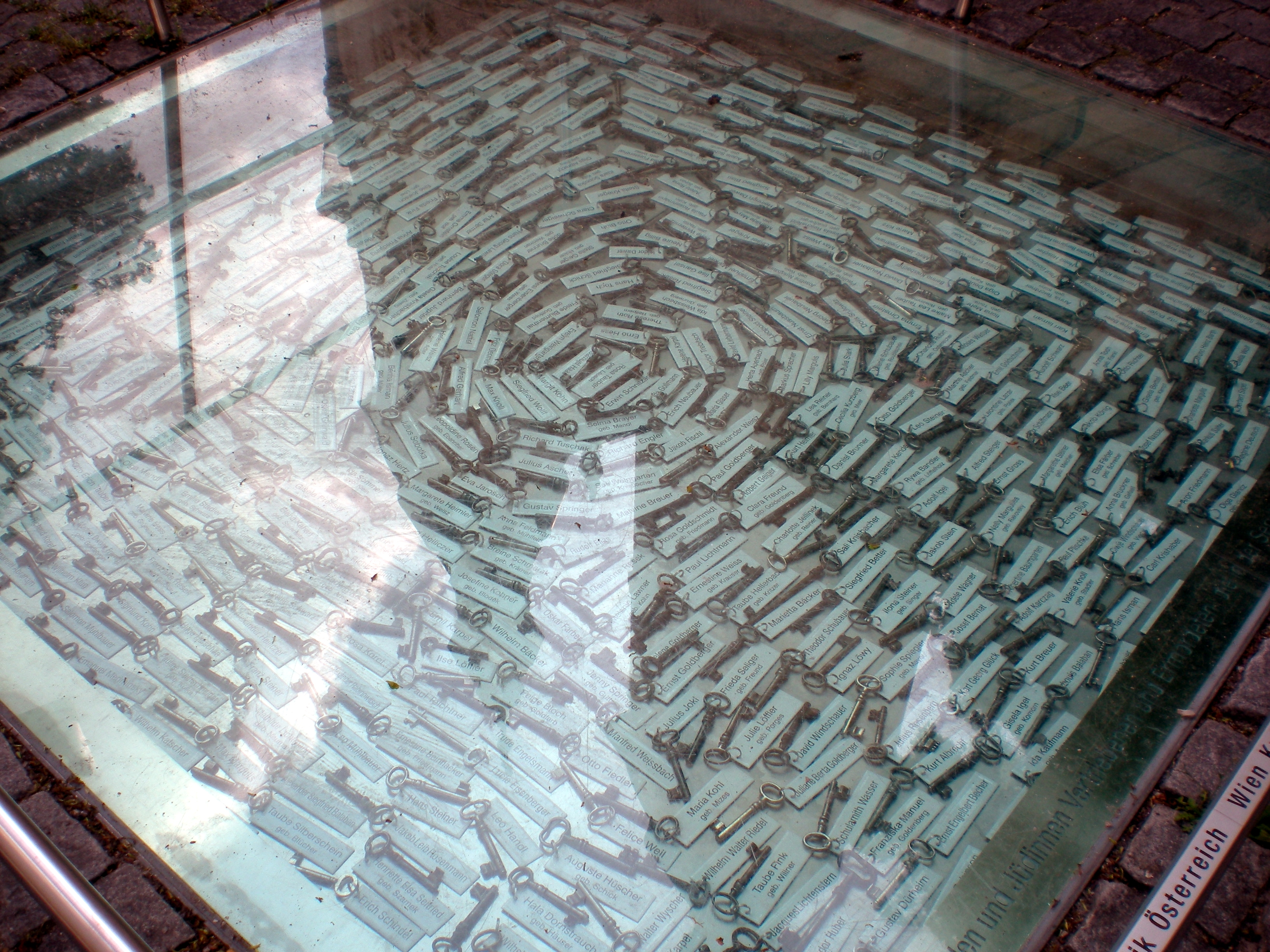 Installation "Schlüssel gegen das Vergessen - Servitengasse 1938", Wien 9